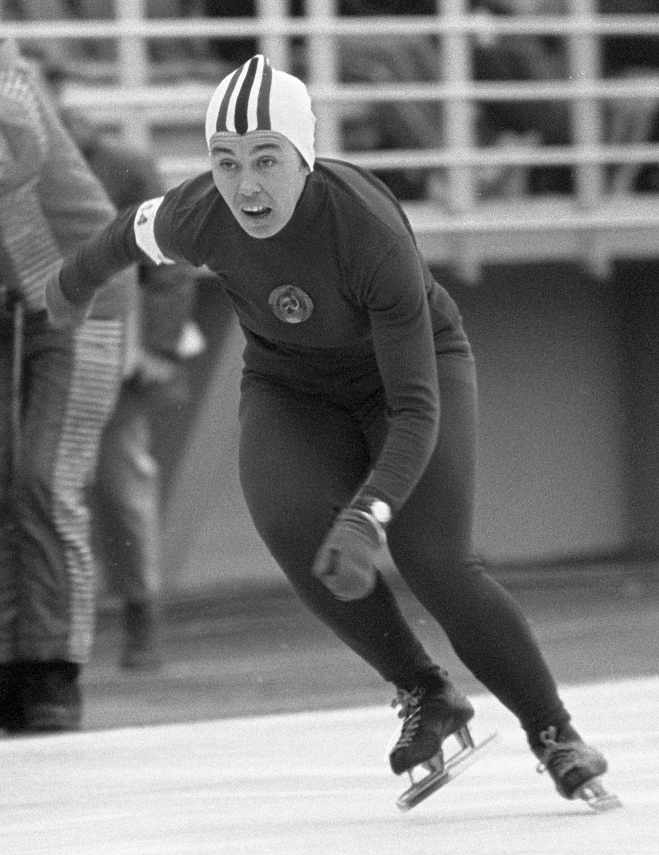 Olympische Spelen Grenoble, Egorova, nummer 21